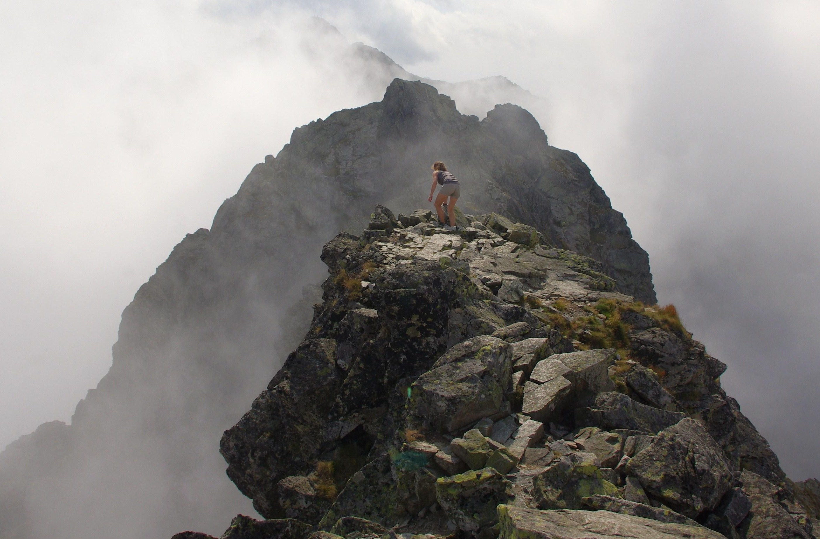 Szczyt w polskich Tatrach Wysokich